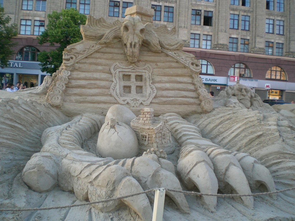 г.Харьков, пл.Свободы, фестиваль скульпторов, песчаный городок